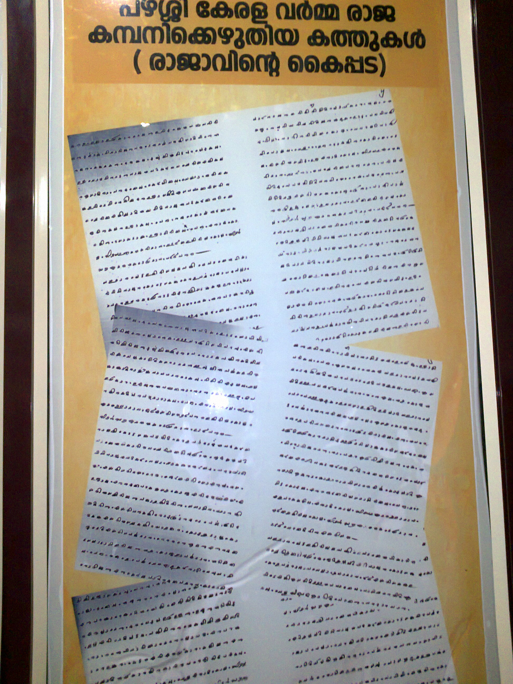 പഴശ്ശിരാജാവ്‌ കമ്പനി പട്ടാളത്തിന് എഴുതിയ കത്തിന്റെ കൈ പട